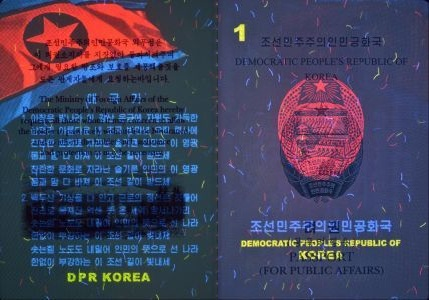 조선말: 흑광등 아래 조선화국려권 선언문 페이지